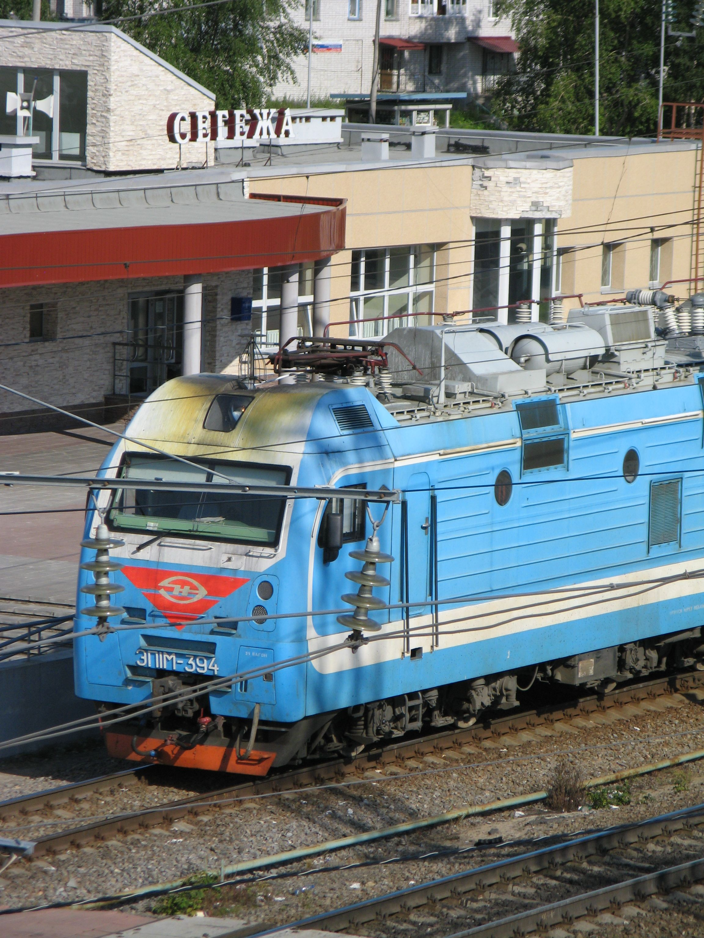 Новый железнодорожный вокзал в г. Сегежа.